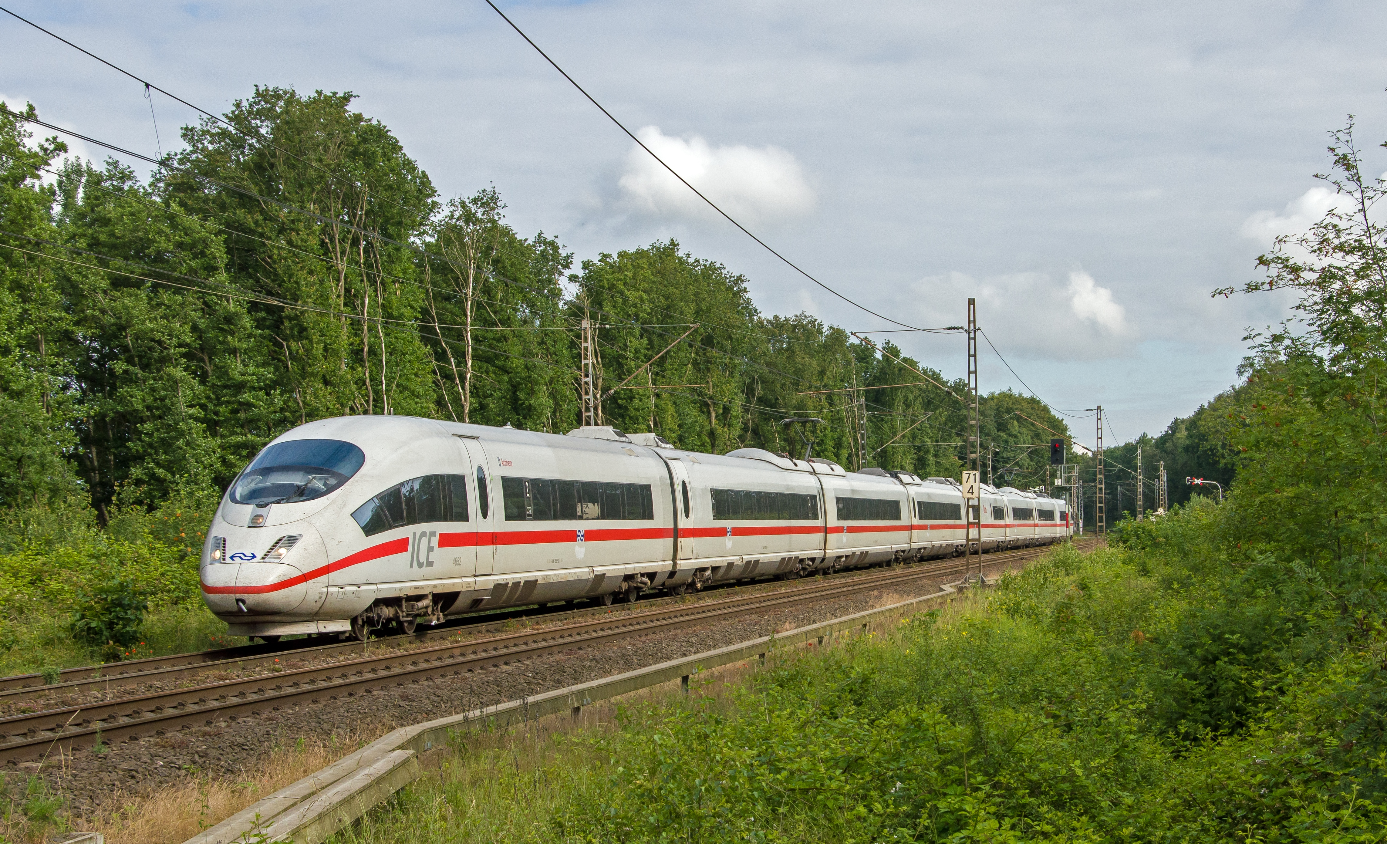 Met weinig subtiliteit heeft NS het Hi-Speed logo van haar ICE3m treinstel verwijderd. Op de witte plekken aan de zijkant onder het logo lijken ze zo weggekwast te zijn. Treinstel 4652 als ICE 105 onderweg bij Elten.